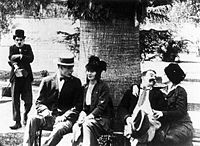 fotografía de la película Those Love Pangs de Charlie Chaplin de 1914.